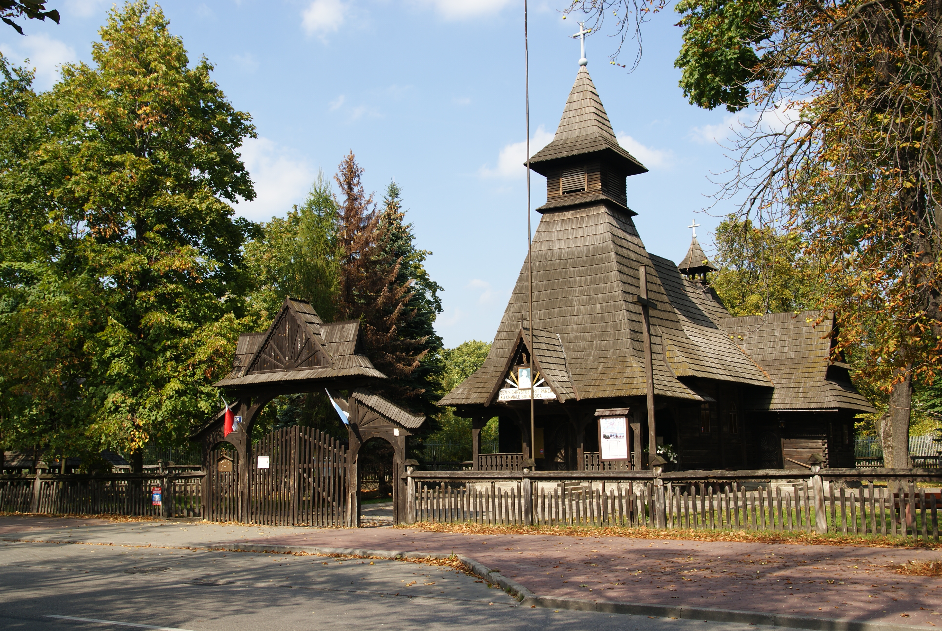 Zespół kościoła par. p.w. Przemienienia Pańskiego: kościół, drewn. dzwonnica, drewn. ogrodzenie z bramką, drewn. Kielce, Kolonia 9, Kielce 401/1-3 z 14.04.1.